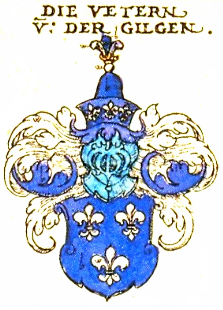 Stammwappen derer Vetter von der Lilie (Gilgen); in: Johann Siebmacher: New Wappenbuch; eingescannt aus: Horst Appuhn (Hrsg.), Johann Siebmachers Wappenbuch. Die bibliophilen Taschenbücher 538, 2. verbesserte Auflage , Dortmund 1989 Bayerische [Ritterschaft und Adel], Blatt 92